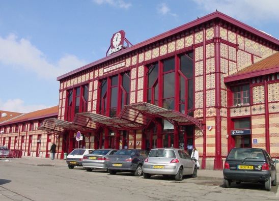 Saint Etienne Station, avant les travaux du tram. Saint-Etienne.